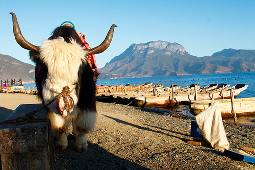 Lugu Lake shore